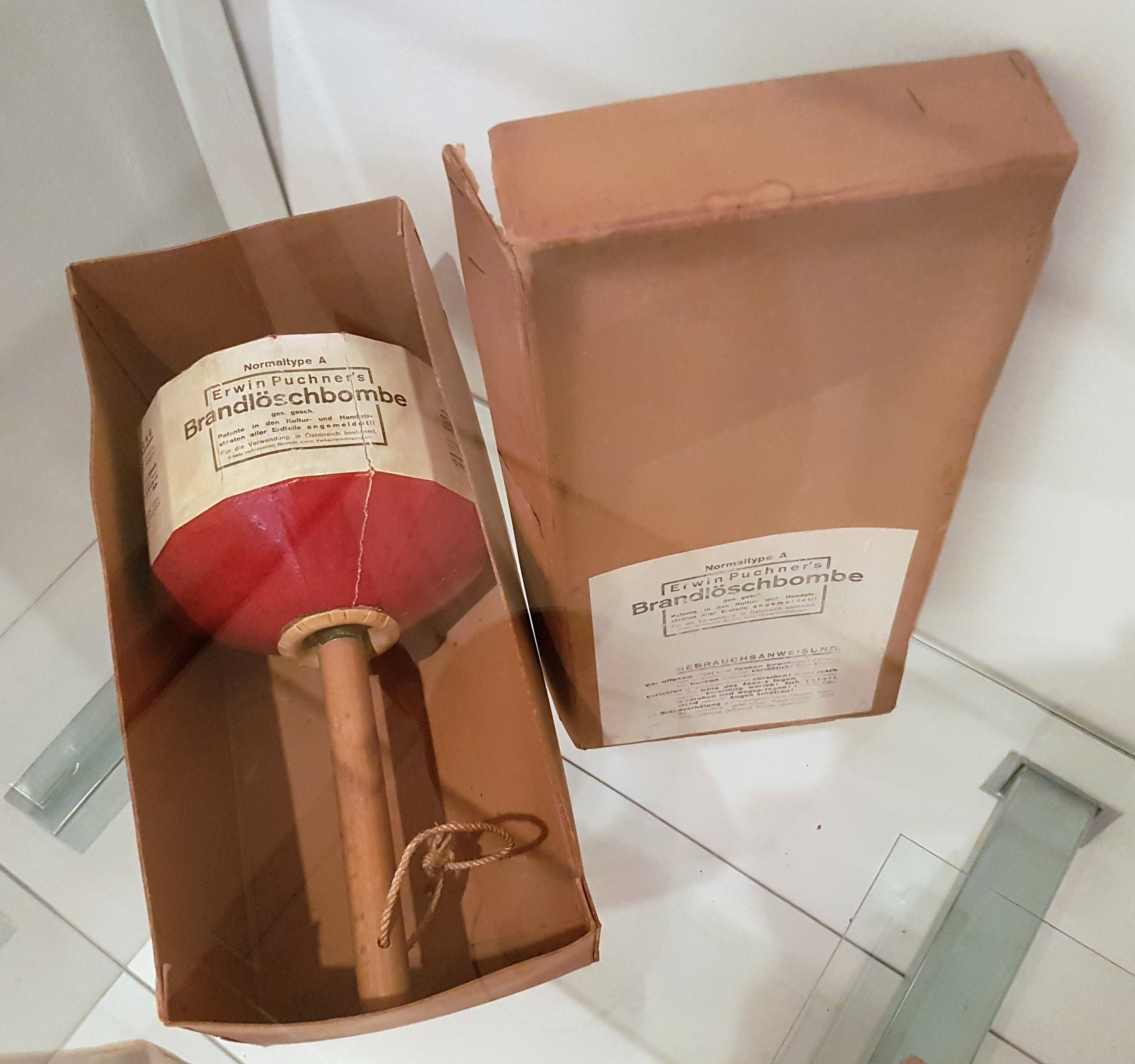 Brandlöschbombe, ausgestellt im Steirischen Feuerwehrmuseum. Durch die Explosion sollte Wasser fein verteilt und somit der Brand gelöscht werden.